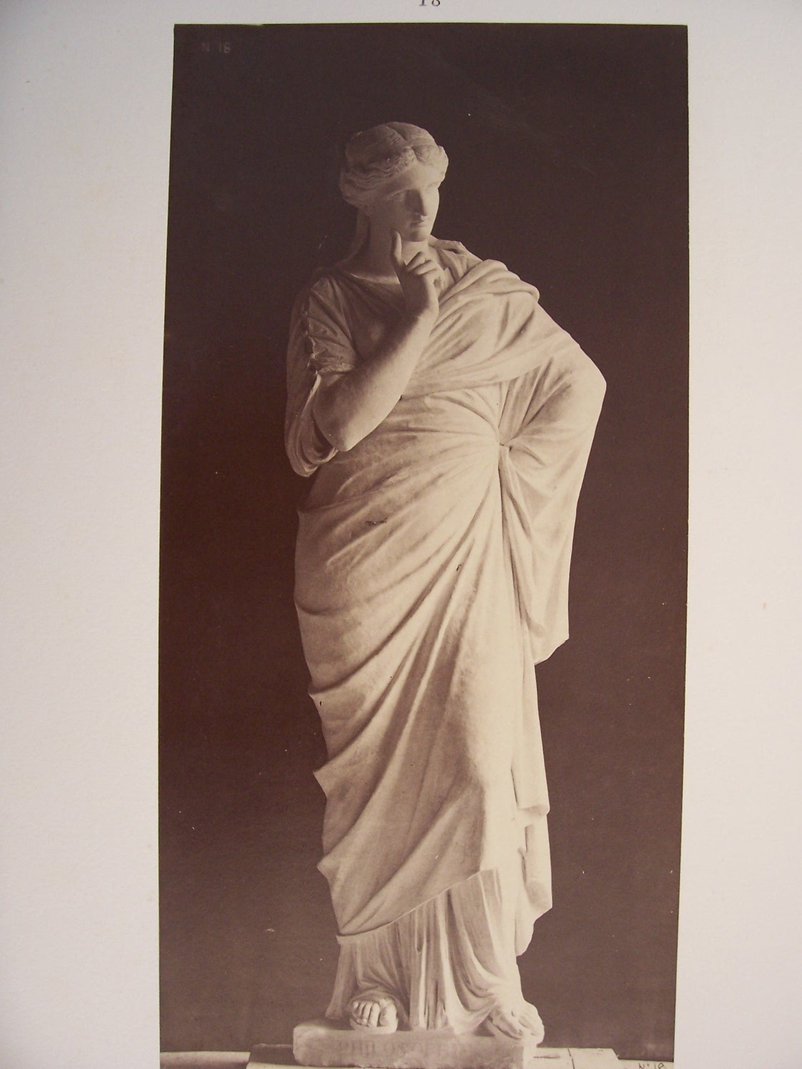 Le Nouvel Opéra de Paris. Statues décoratives (35 planches) Statues dans le Grand Foyer: Planche 18: La Philosophie (par Tournois)